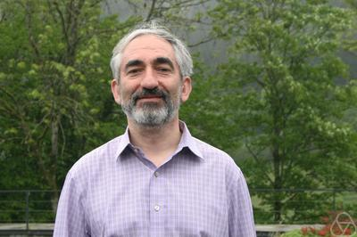 Foto di Michael Krivelevich